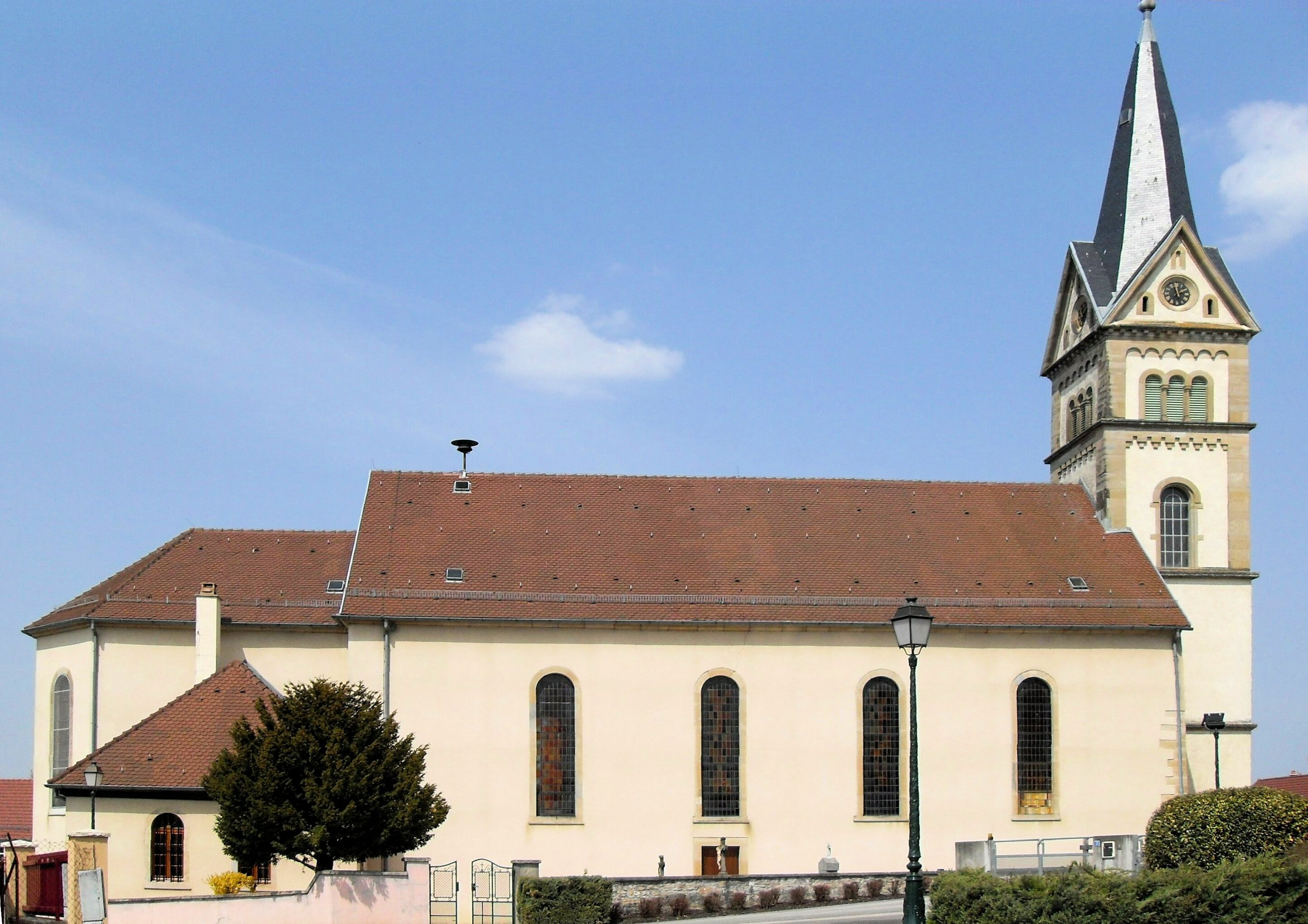 L'église Saint-Blaise à Tagsdorf